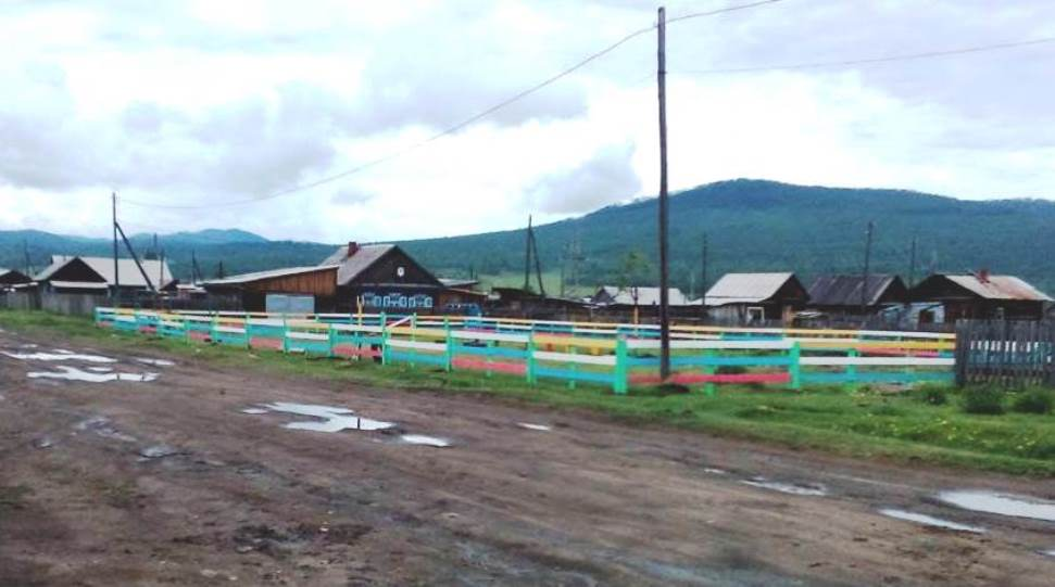 Детская площадка, построенная весной 2018 года